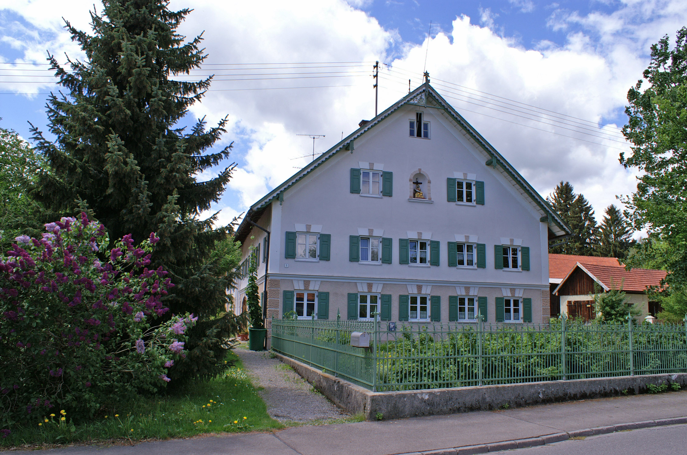 Lamerdinger Str. 1 in Kleinkitzighofen, Lamerdingen